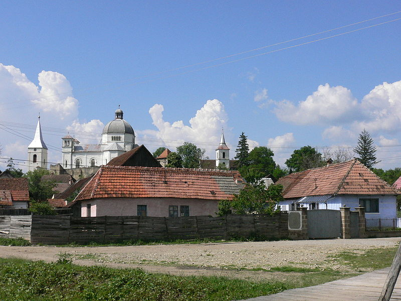 A bölöni (Kovászna megye) unitárius vártemplom látképe